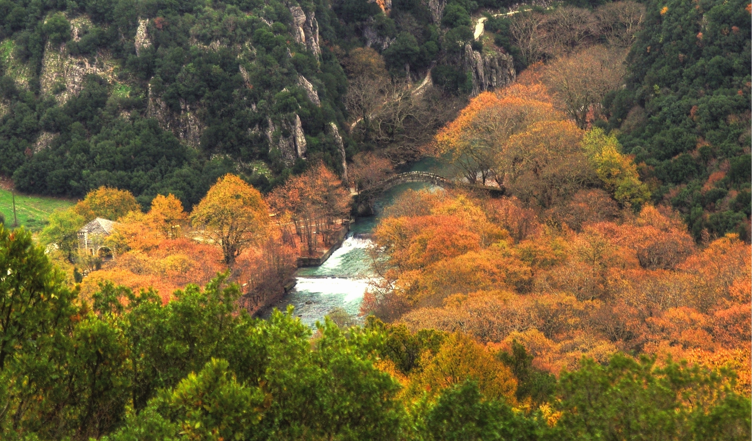 Ο Βοϊδομάτης στην Κάτω Κλειδωνιά, στον Εθνικό Δρυμό Βίκου - Αώου. This is a photography of Natura 2000 protected area with ID GR2130001